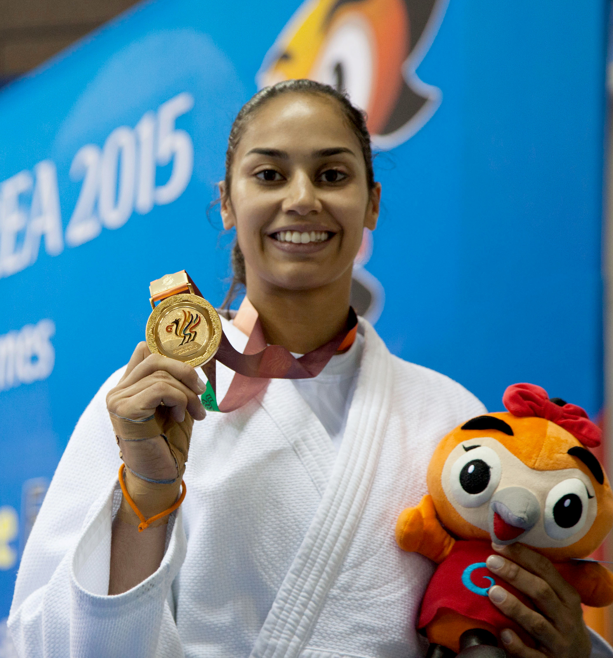 Premiação do Judô feminino. Mariana do Brasil leva o ouro. Foto: Johnson Barros